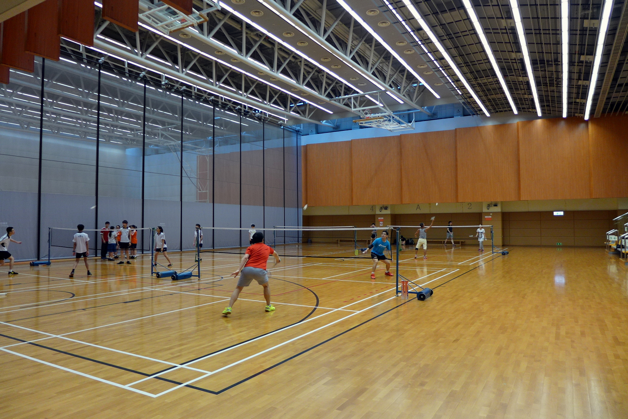 Siu Sai Wan Complex Multi-purpose arena